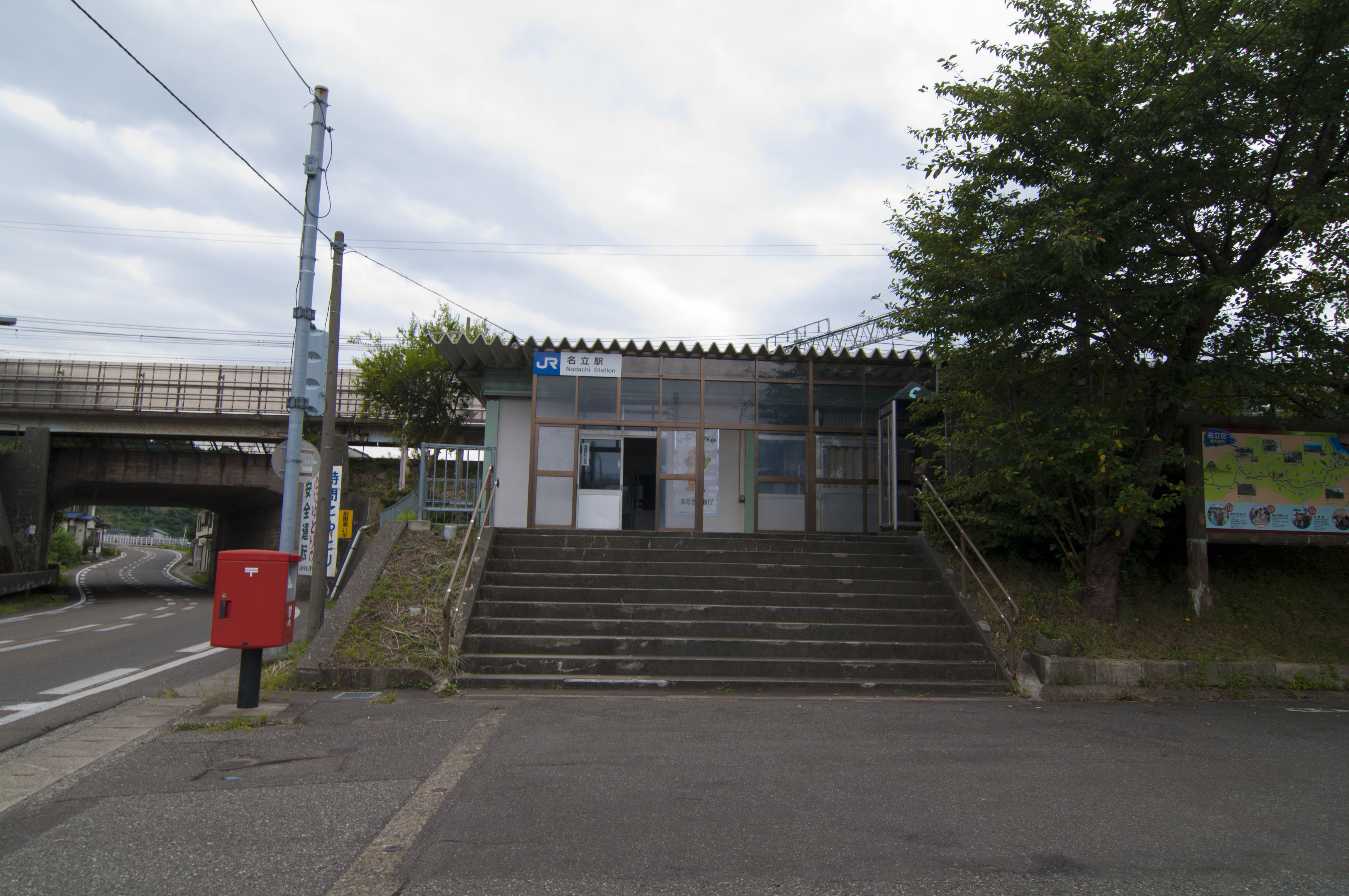 西日本旅客鉄道株式会社北陸本線名立駅駅舎